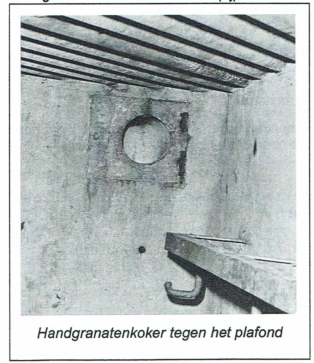 Handgranatenkoker